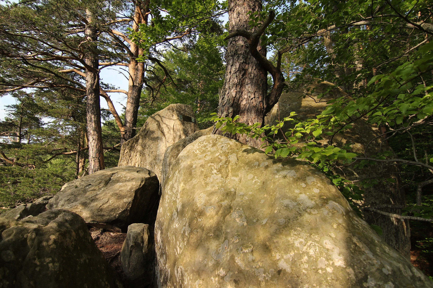 Schitul rupestru "Agatonul Vechi" 02